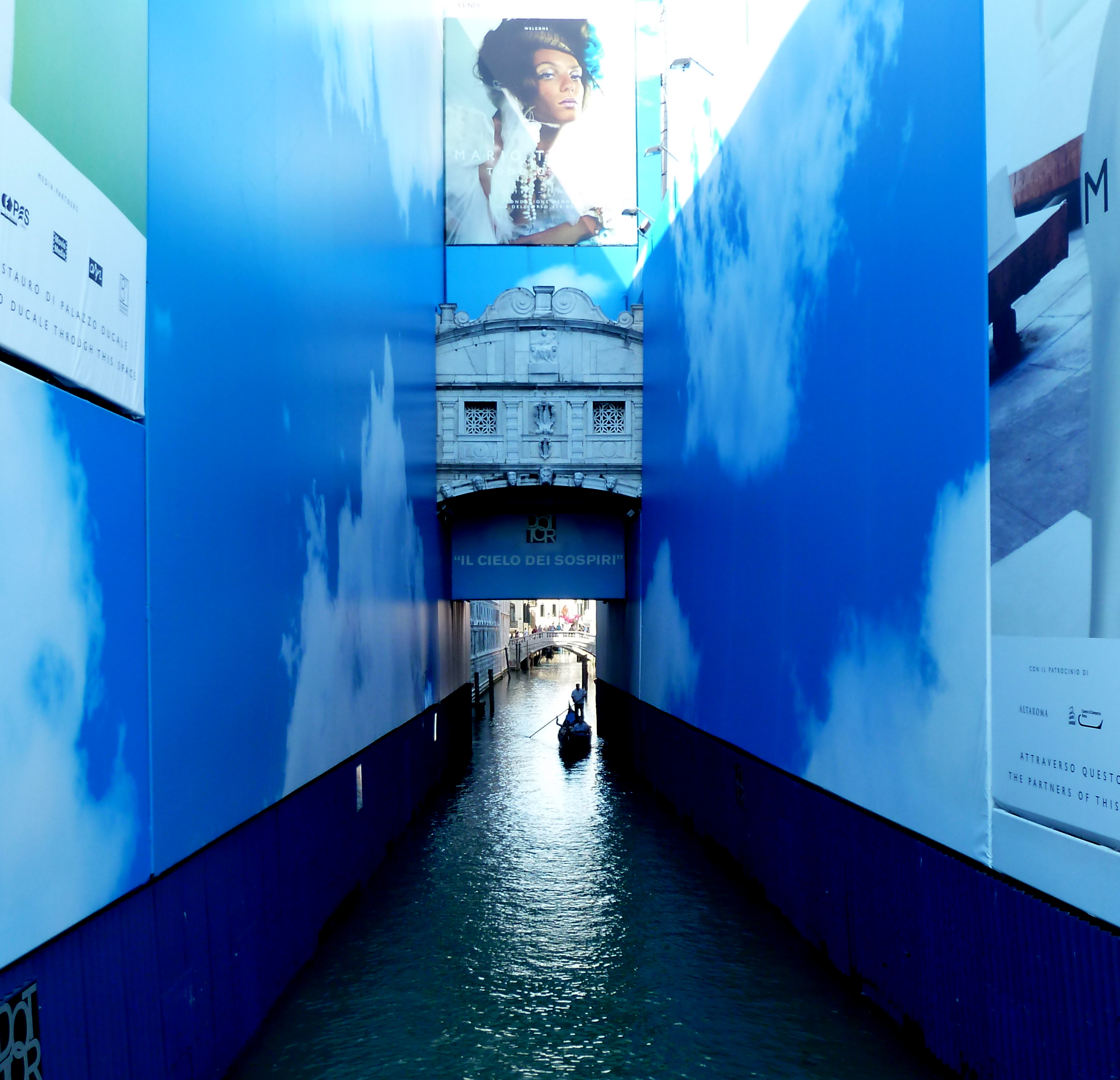 Venezia